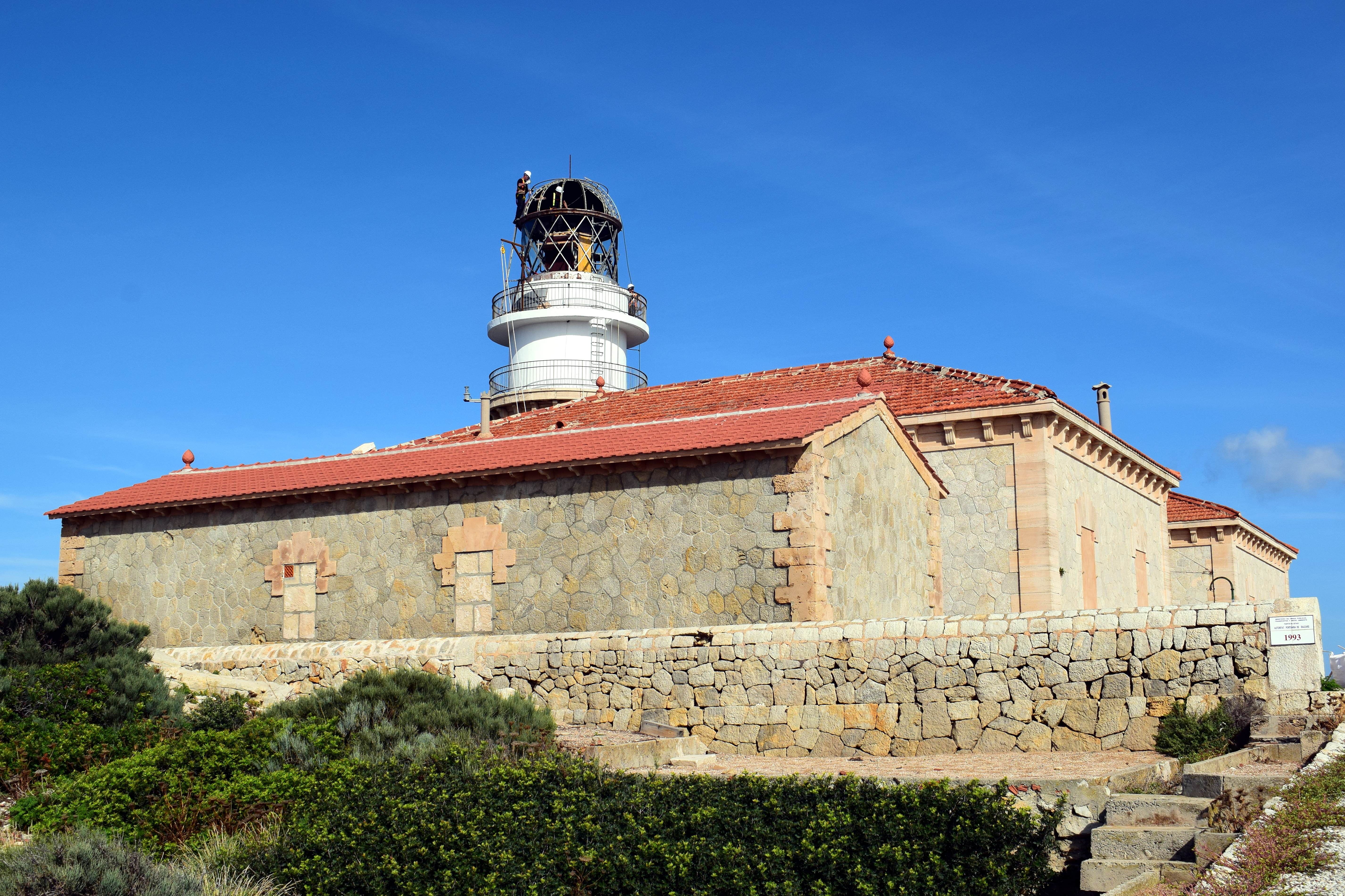 Leuchtturm Far de Llebeig auf Sa Dragonera, Balearen, Spanien.